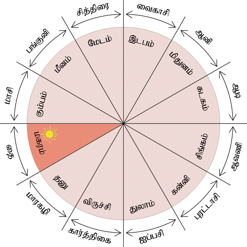 Drawn by the user who uploaded it here.